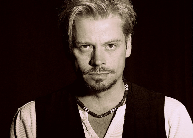 Schauspieler / Actor Torsten Schemmel